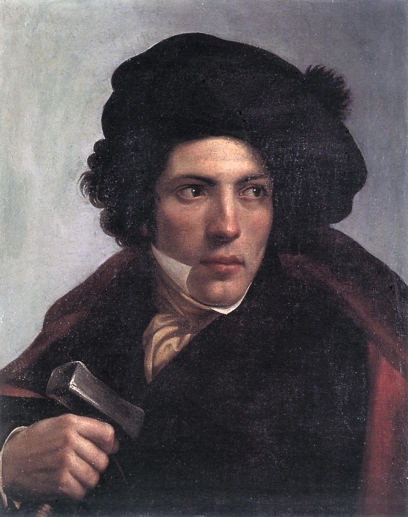 Ritratto dello scultore Tommaso Bandini (1807-1849), fatto dal cugino Enrico Bandini (presso Pinacoteca Stuard, Parma).